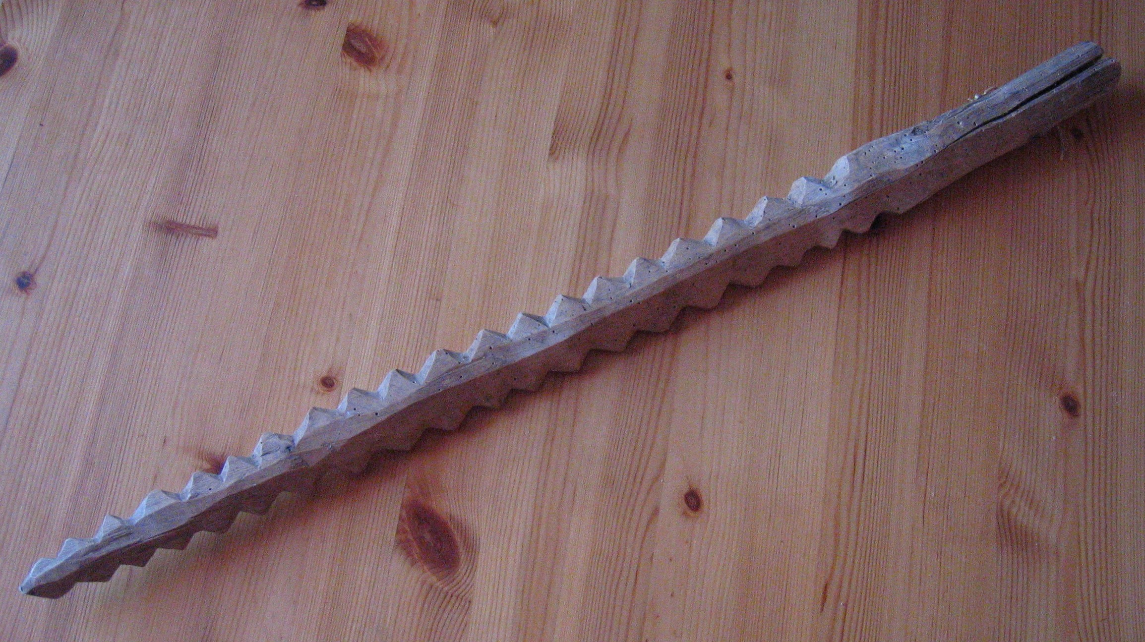 Equipment for treshing, used in Norway. Skjedde, reiskap for tresking.